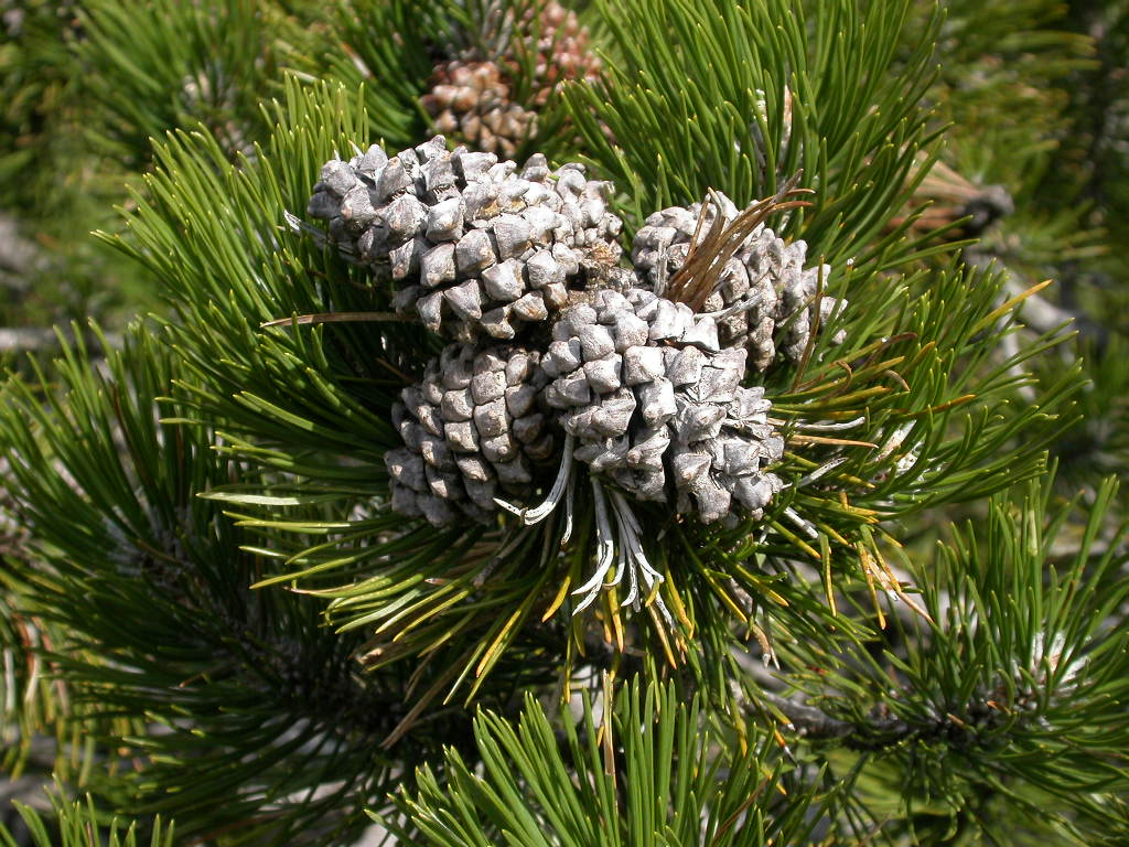 Pinus uncinata detall pinyes